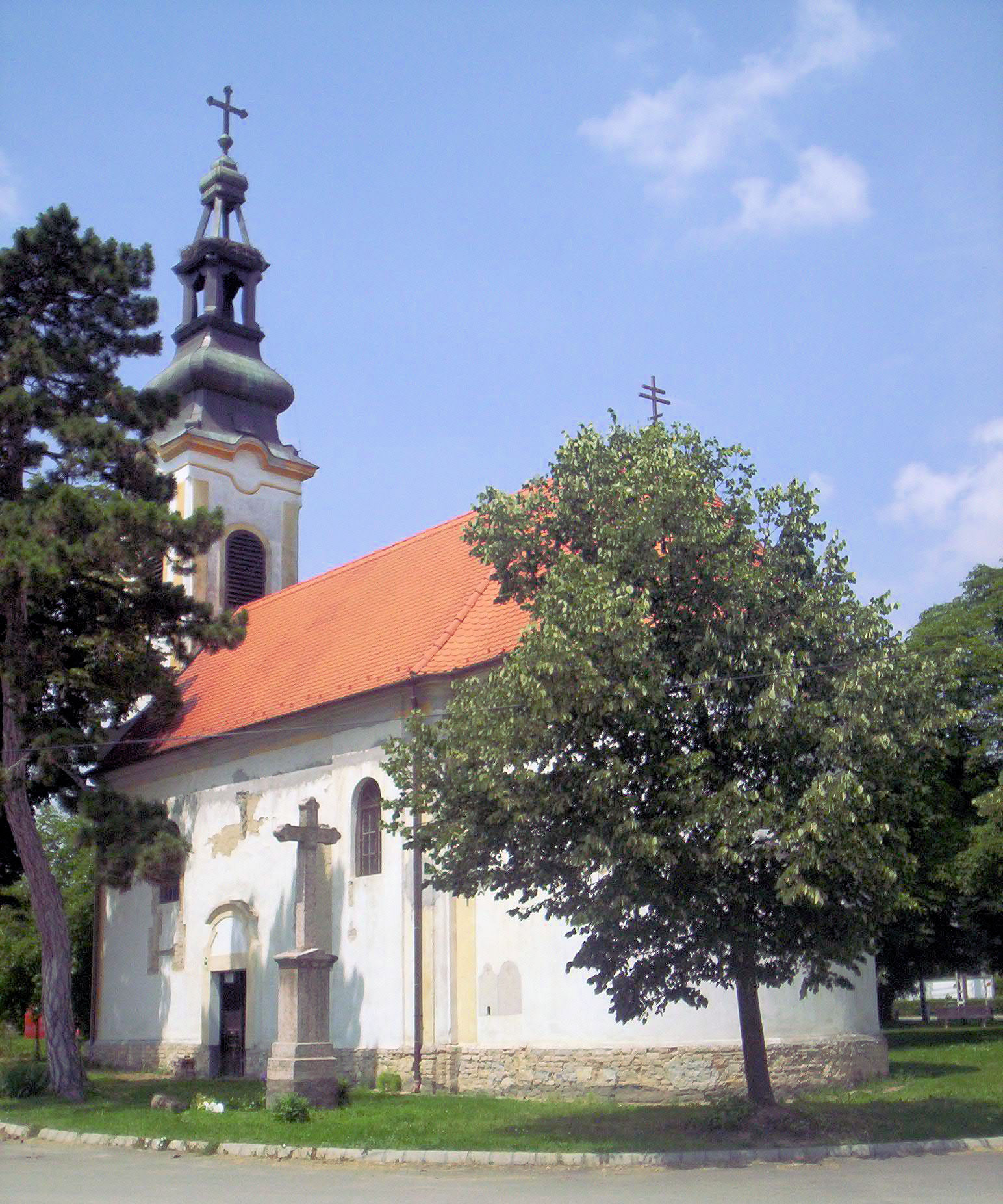 A majsi Szent Paraszkéva szerb orthodox templom. Épült a 17. század végén. – photo taken by uploader User:Csanády in 2006.